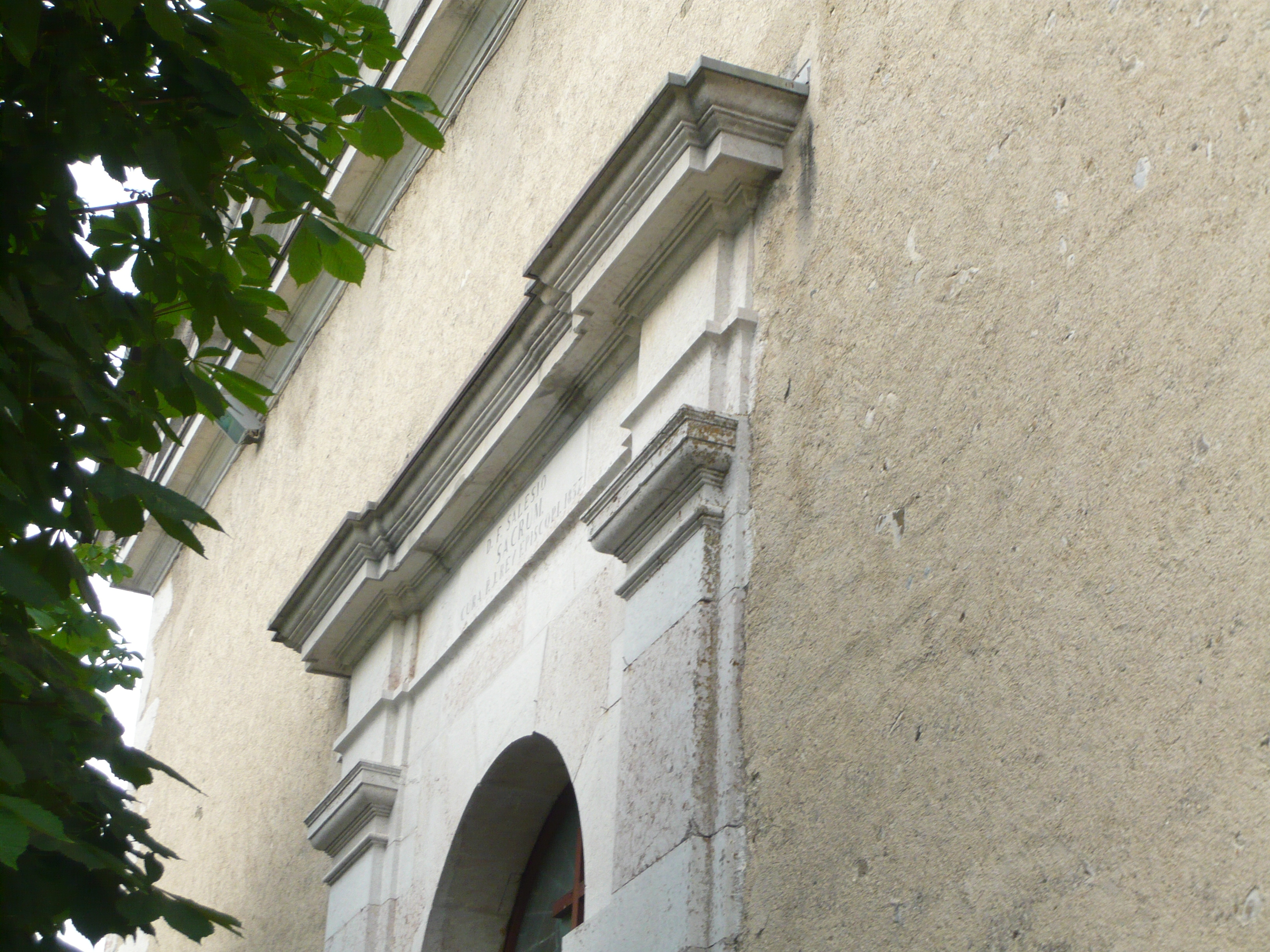 porte principale (église Saint-François-de-Sales d'Habère-Poche)